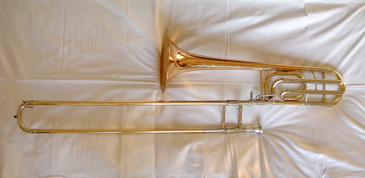 trombone à coulisse - pas de copyright, utilisation gratuite illimitée (for unlimited free use) : Catégorie:Instrument à vent de la famille des cuivres